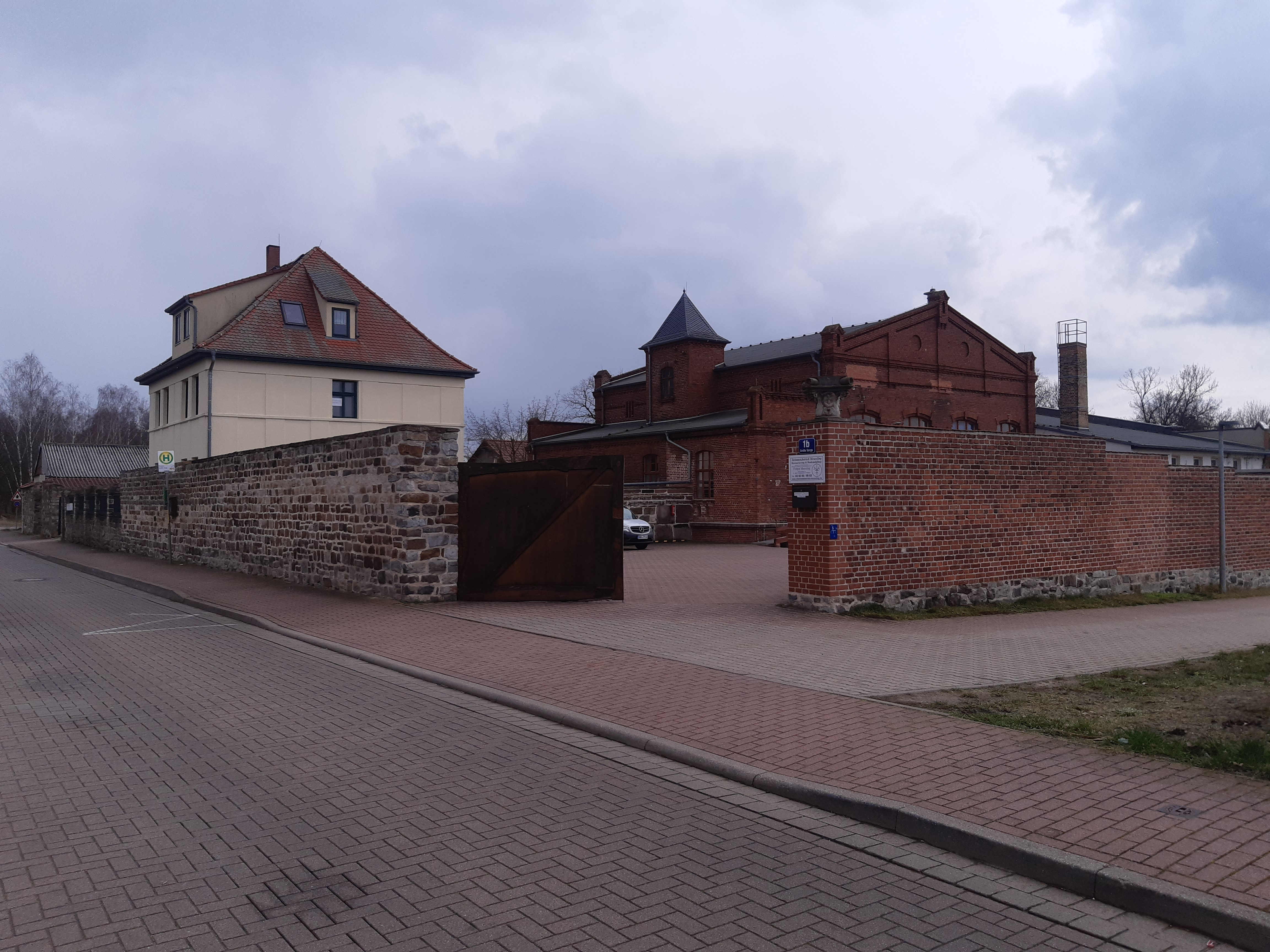 Kraftwerk